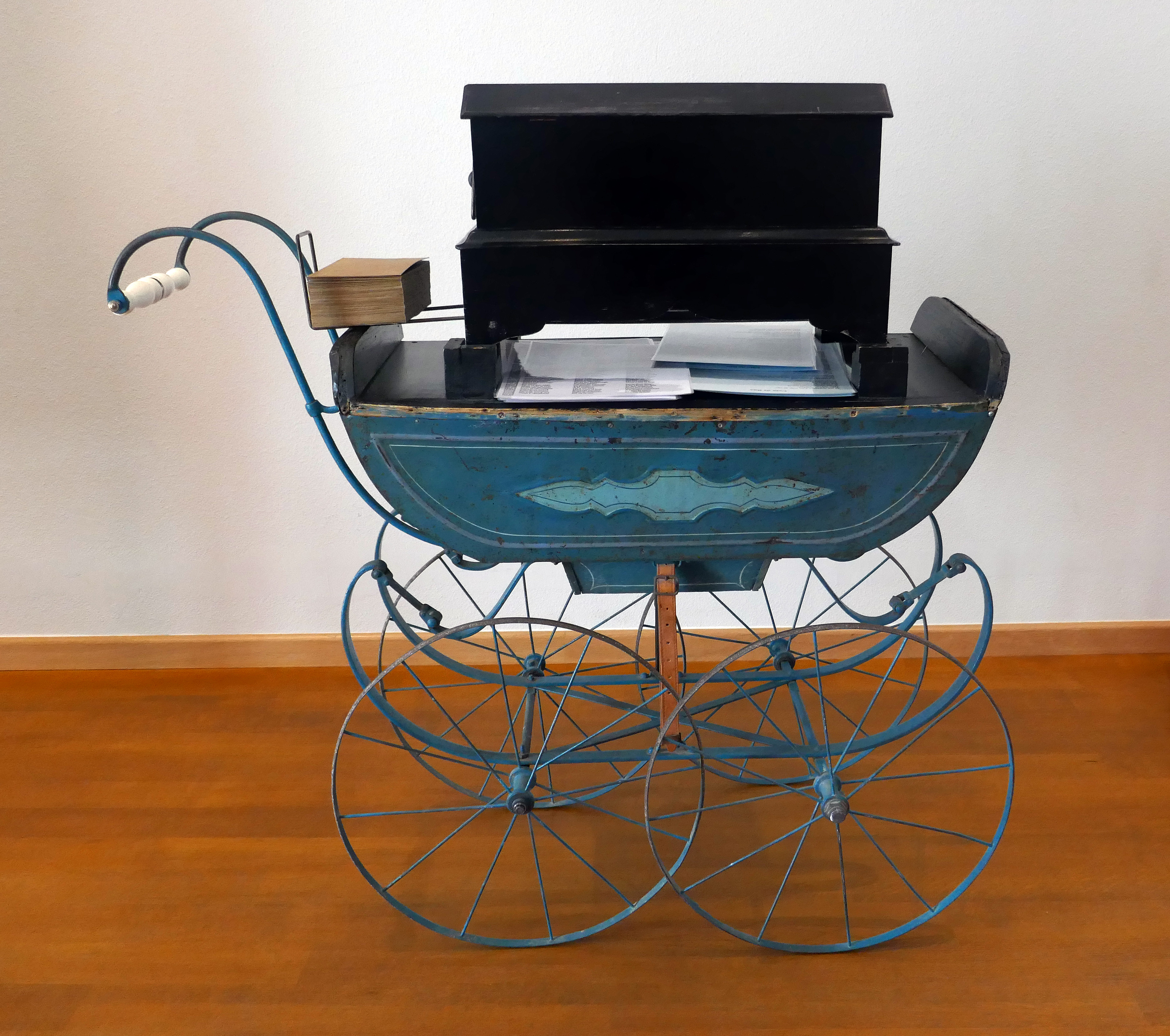 Orgue modèle "Organina" Jérôme Thibouville-Lamy Mirecourt, vers 1887 24 anches libres, à cartons perforés Maison de la musique mécanique et de la dentelle de Mirecourt (Vosges)